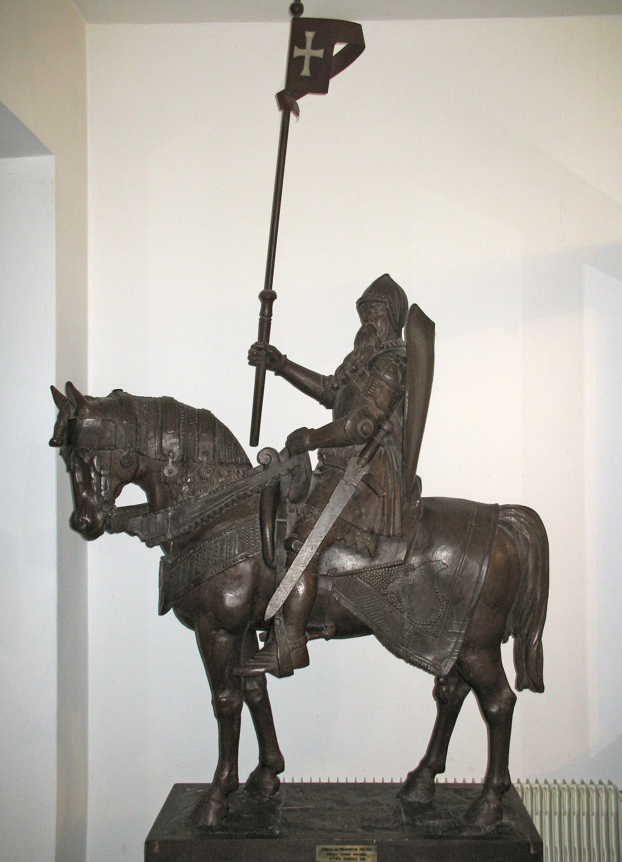 Sculpture by Johann Baptist Moroder-Lusenberg (1870 – 1932) in St. Ulrich in Gröden - Ortisei Val Gardena